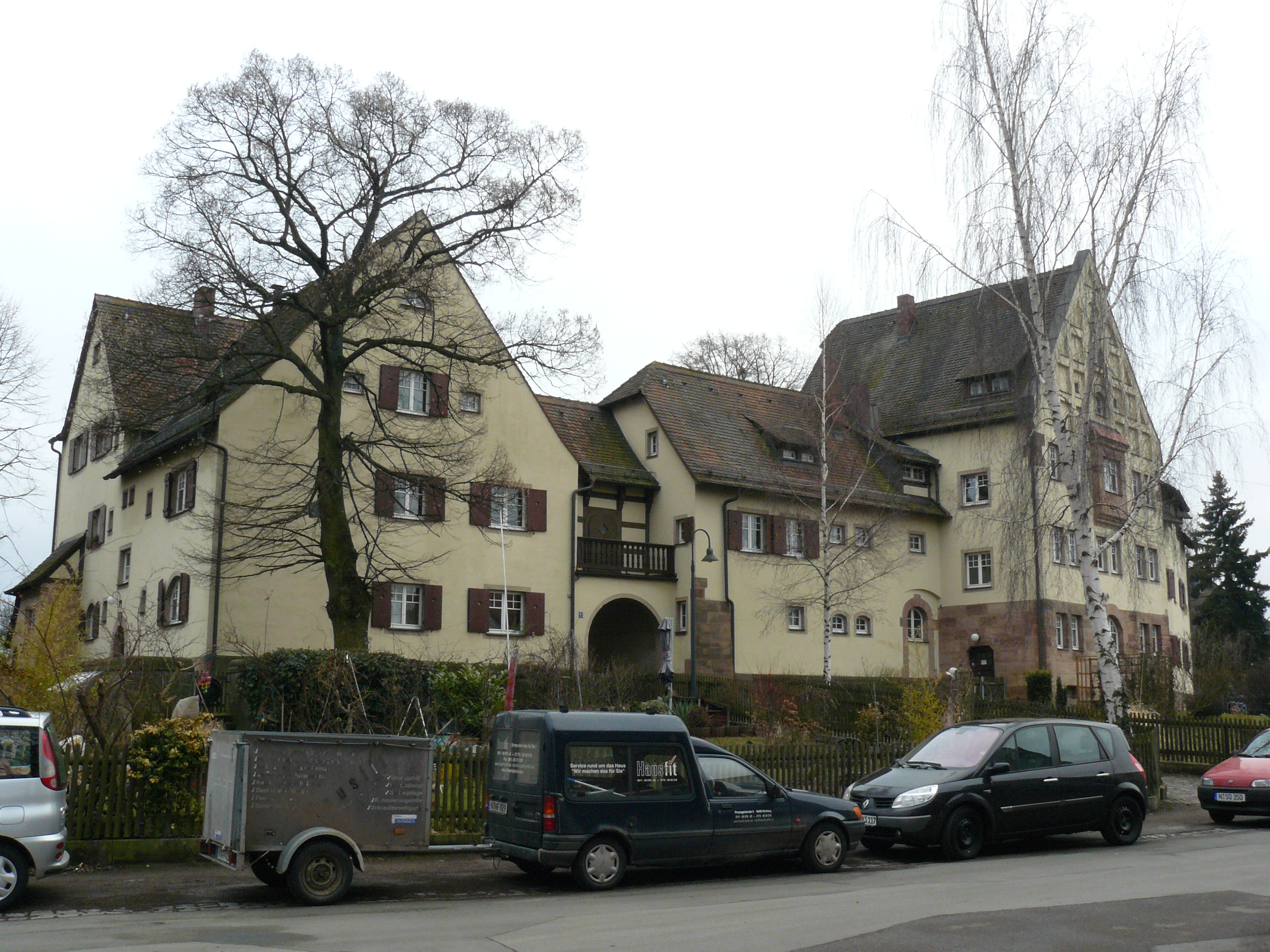 Wohnungsanlage, hufeisenförmige zweigeschossige Häusergruppe in der Art einer Burganlage, 1905; mit Pavillonbau und Mauer im Hof; mit Schnorrstraße 2/4. 49°24′44″N 11°06′10″E / 49.412115°N 11.102736°E